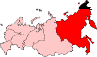 Chukotka Peninsula